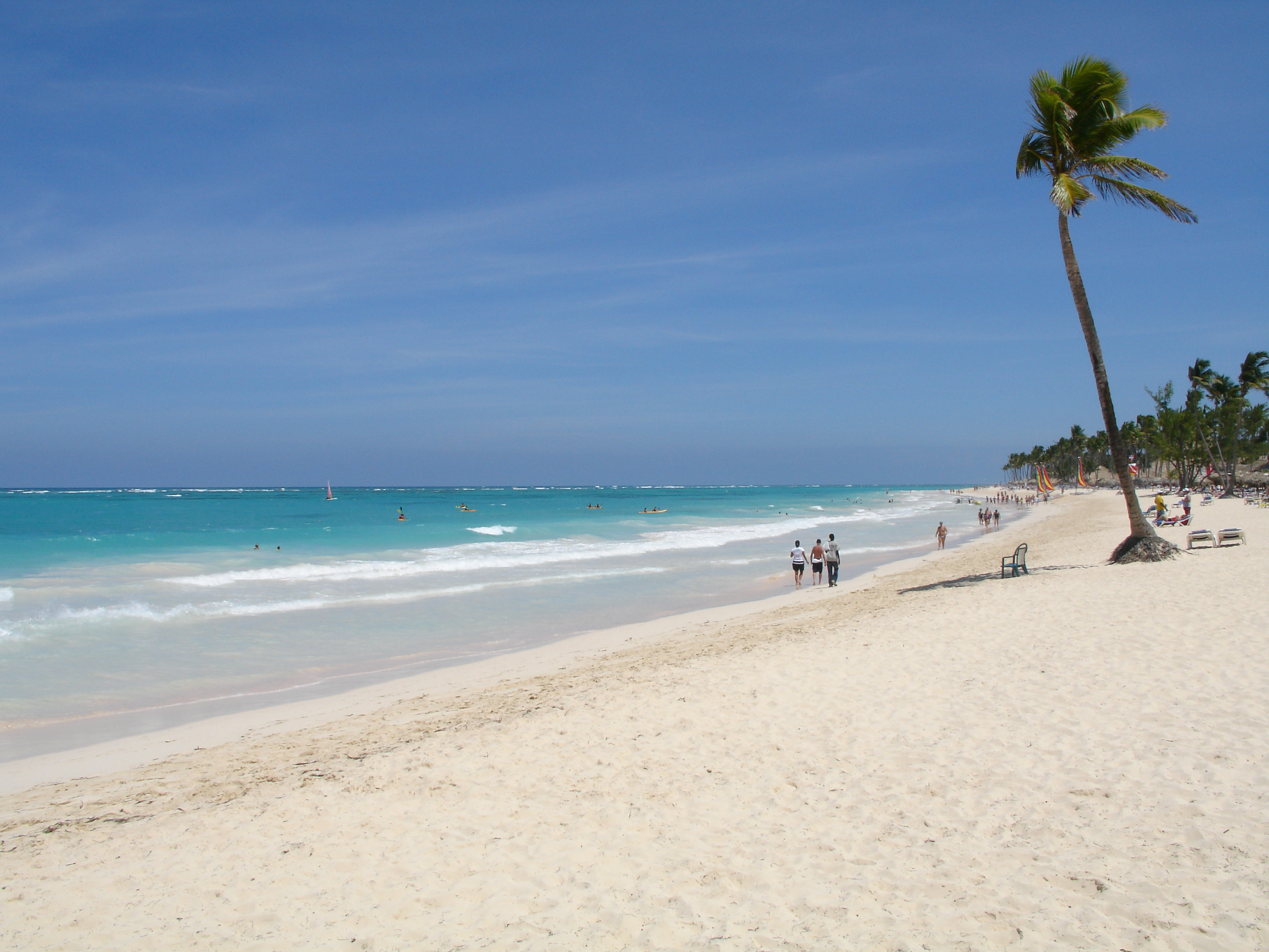 Playa Bavaro, Strand vor dem Hotel Paradisus